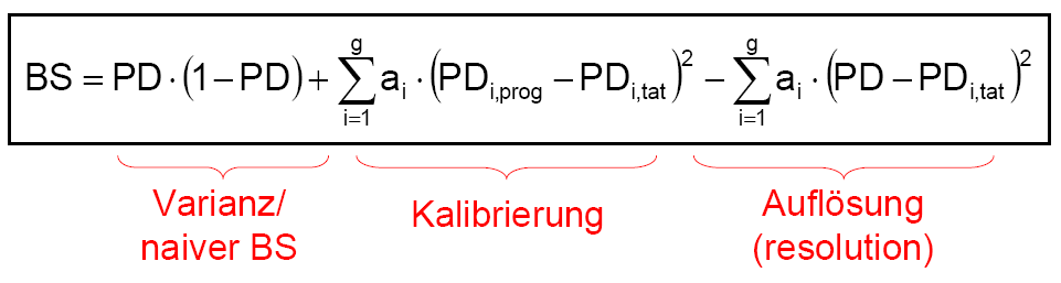 Dekomposition des Brierscores in die Komponenten Varianz, Kalibrierung und Auflösung Quelle: MURPHY, WINKLER (1992, S. 439, Formel 10, eigene Notation)